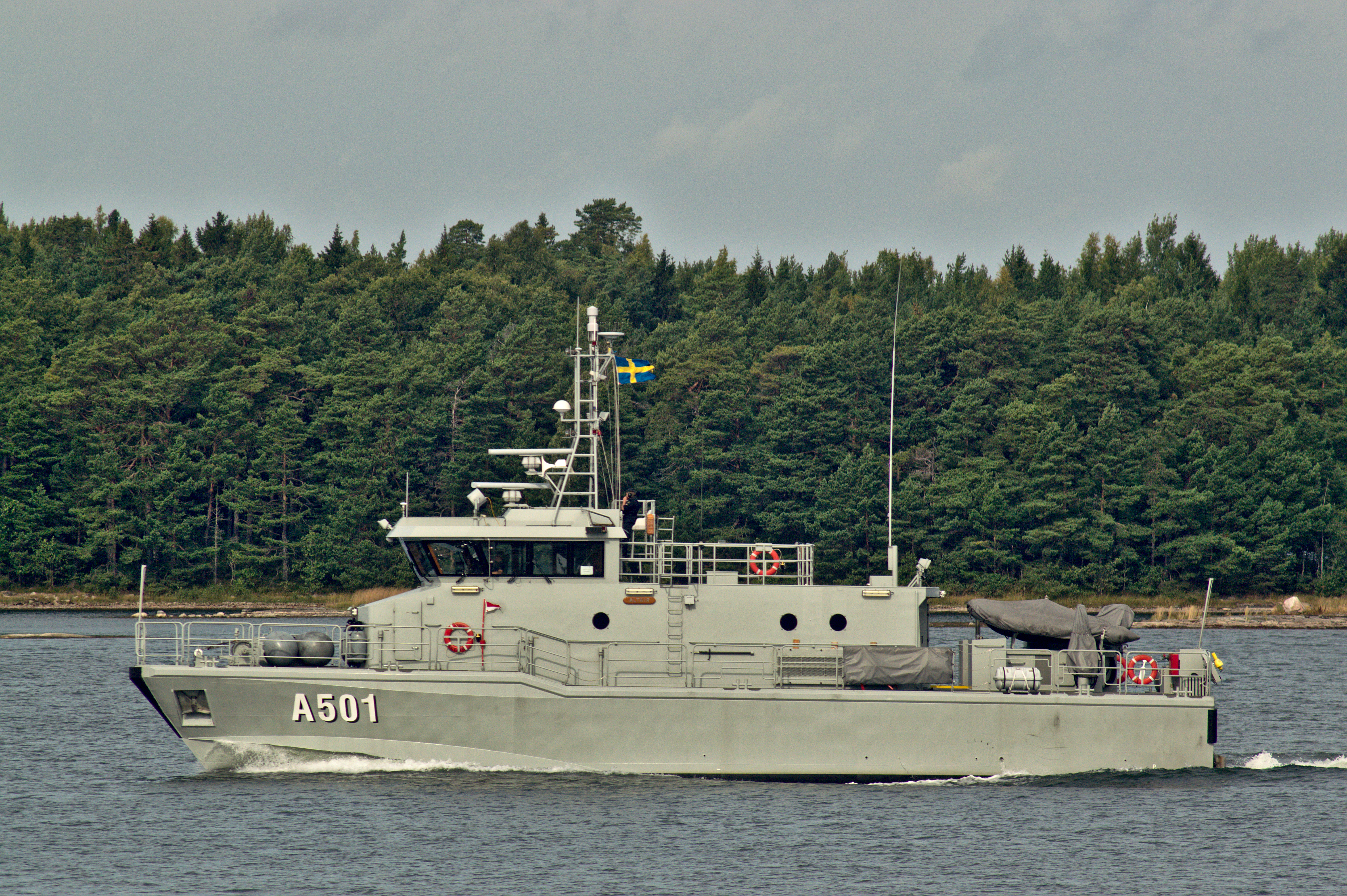 HMS Altair A501 utanför Ornö i augusti 2015.